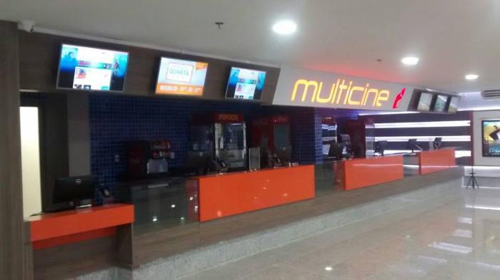 Vista do foyer do Multicine do Shopping Santa Maria, DF